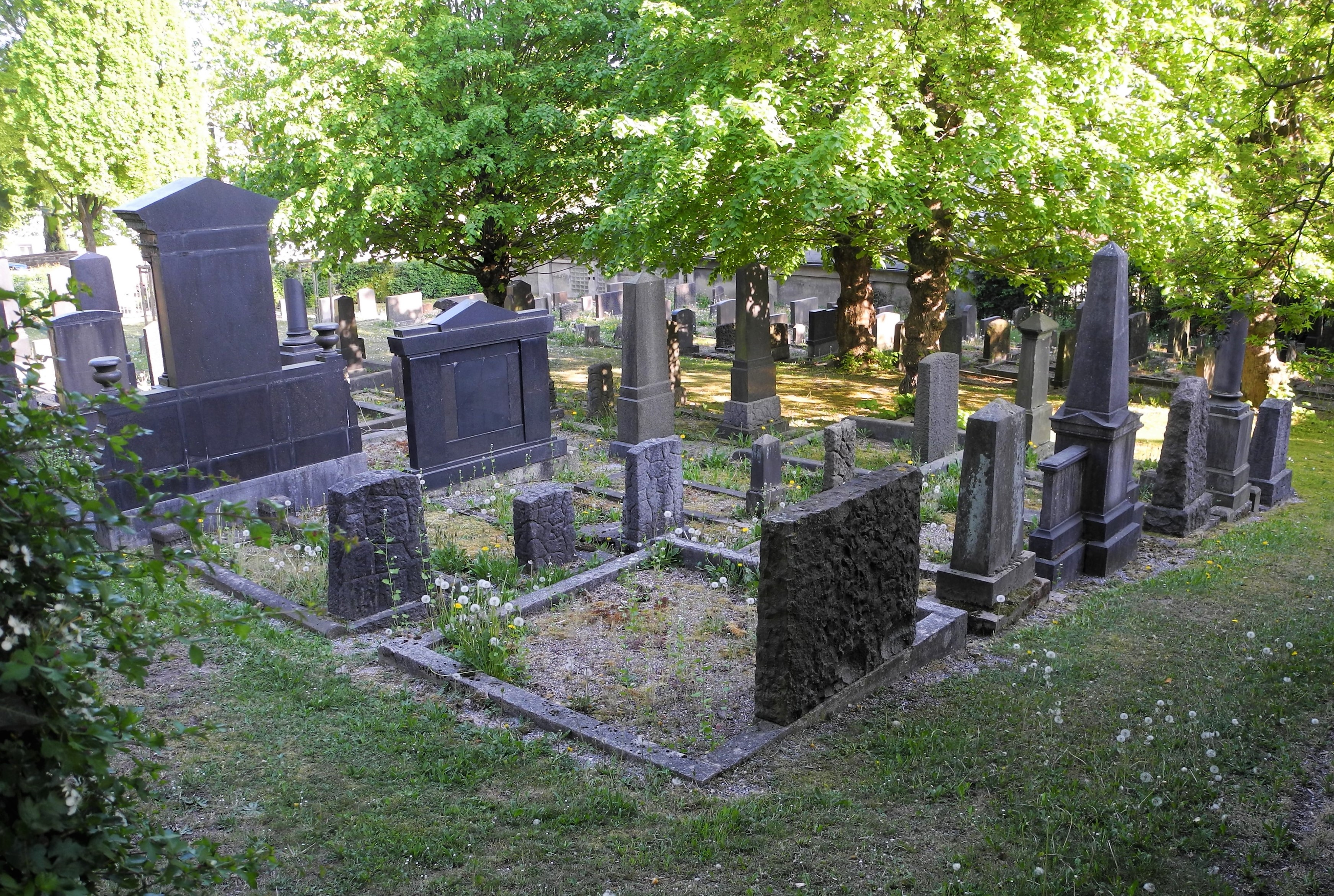 Wuppertal, Wohnquartier Sedansberg, jüdischer Friedhof Hugostraße, Nordwestecke; von Westen sind nur die unbeschrifteten Rückseiten zu sehen, da alle Grabsteine aus religiösen Gründen nach Osten ausgerichtet sind